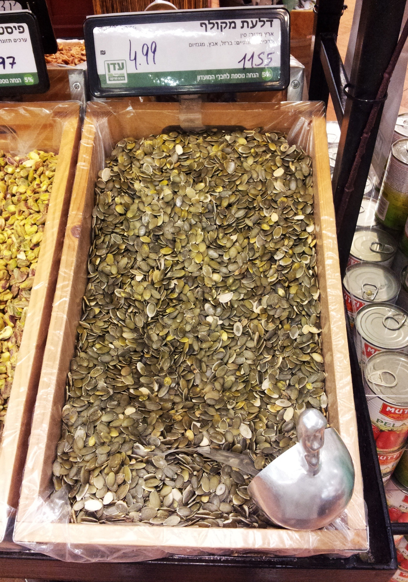 גרעיני חמניות במרכול בירושלים